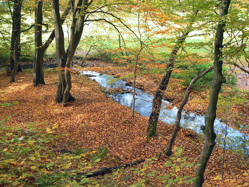 Die Gilsa unterhalb der Burg Schönstein